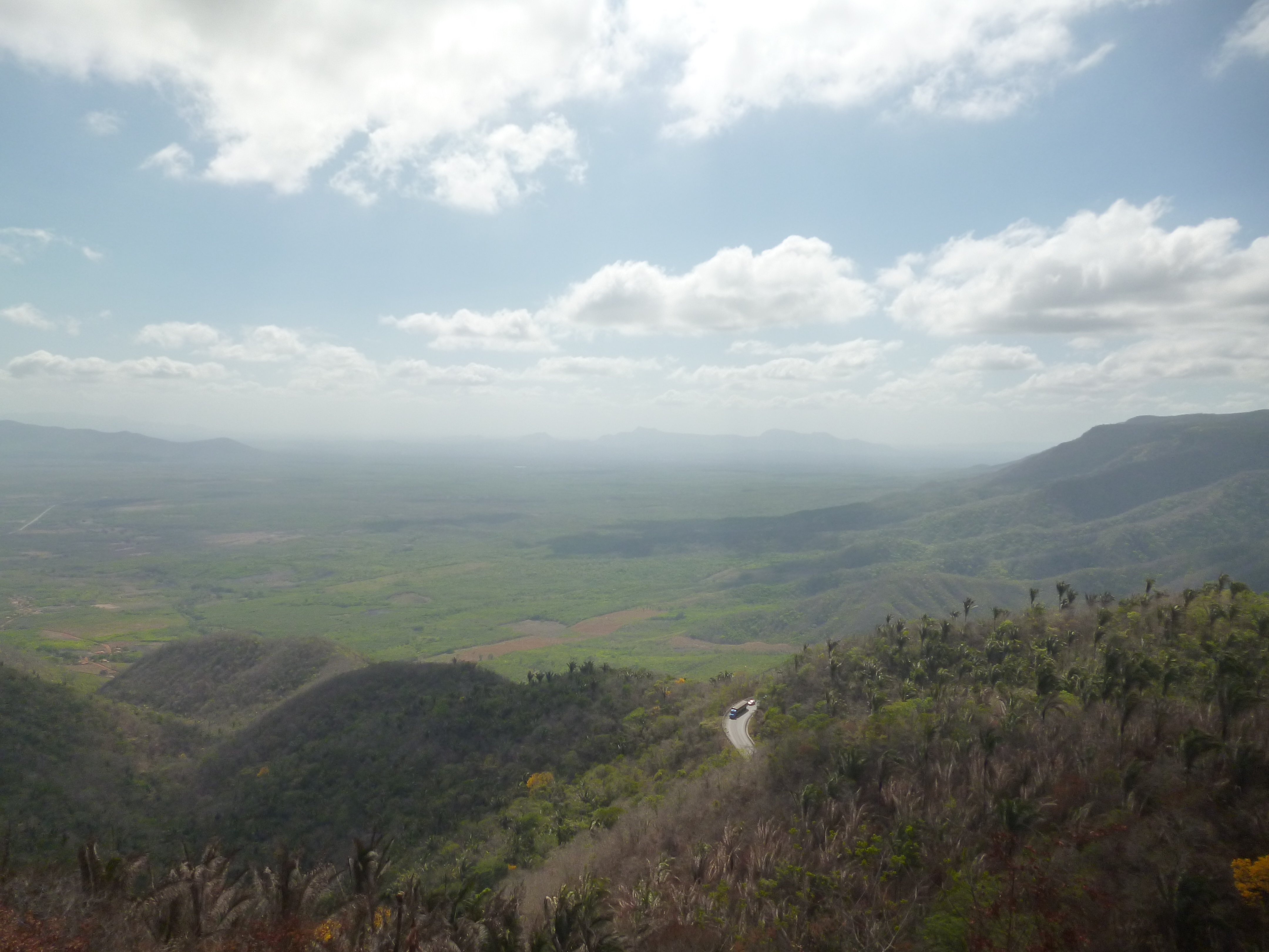 Parque ecológico particular.